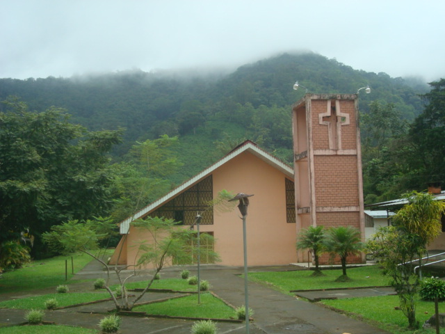 Iglesia de Palmichal de Acosta, Costa Rica.